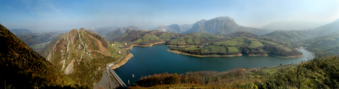 Embalse de Alfilorios, Morcín, Asturias